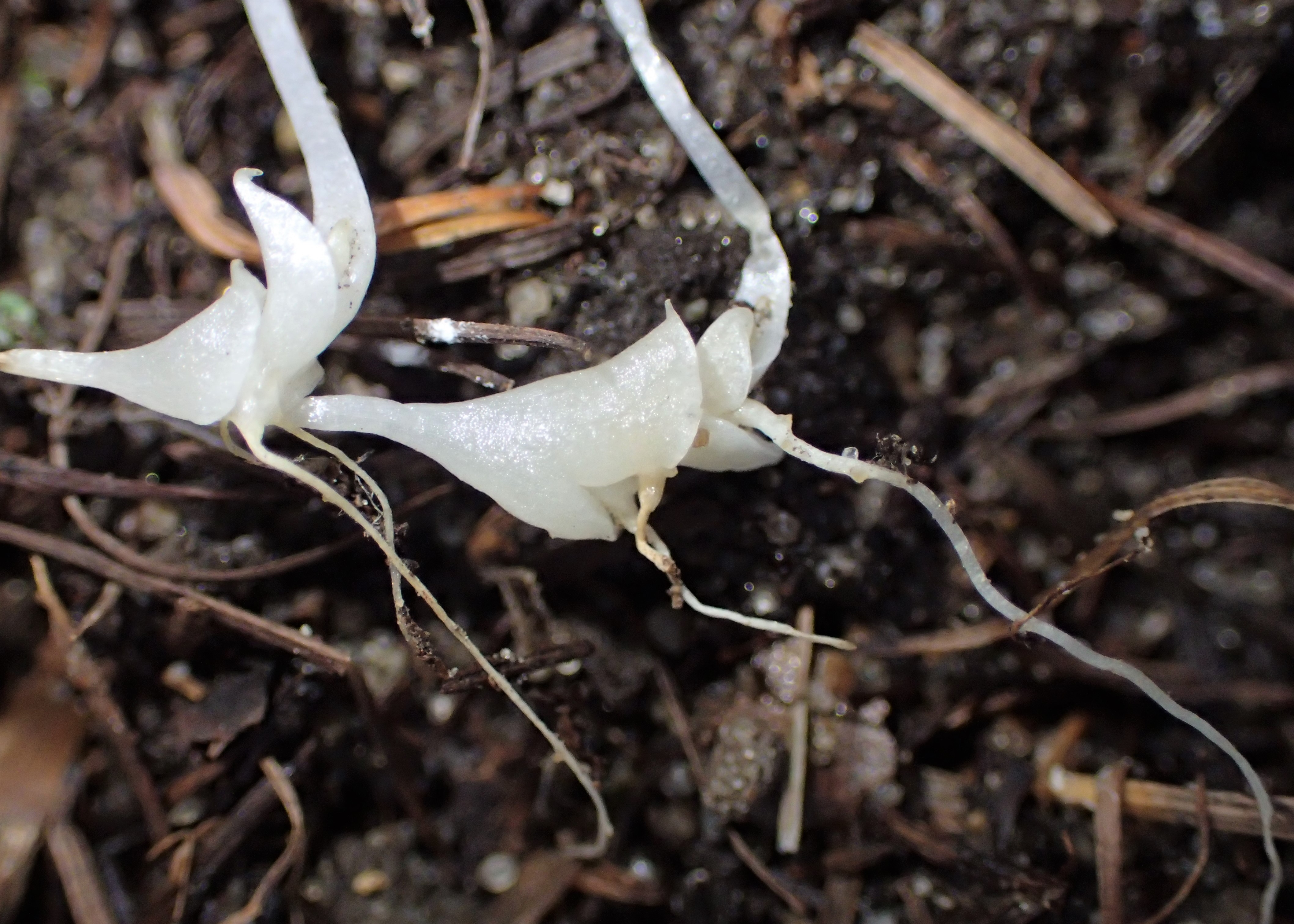 Adoxa moschatellina (young rhizome at the end of winter). Siadło Górne, near Szczecin, NW Poland